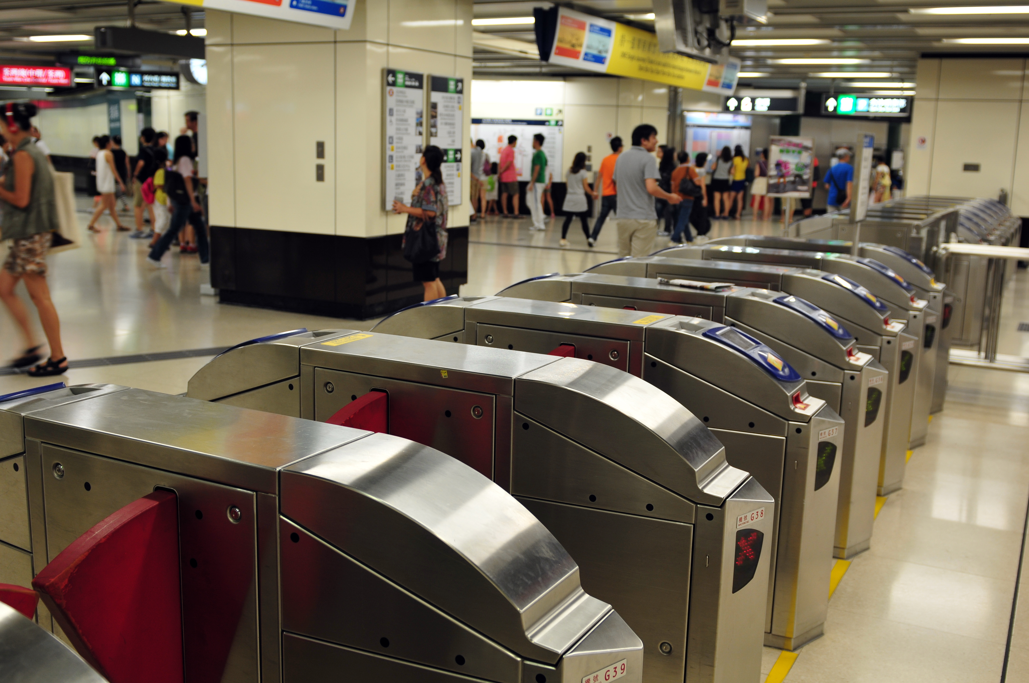 Wikimania 2013 Hongkong